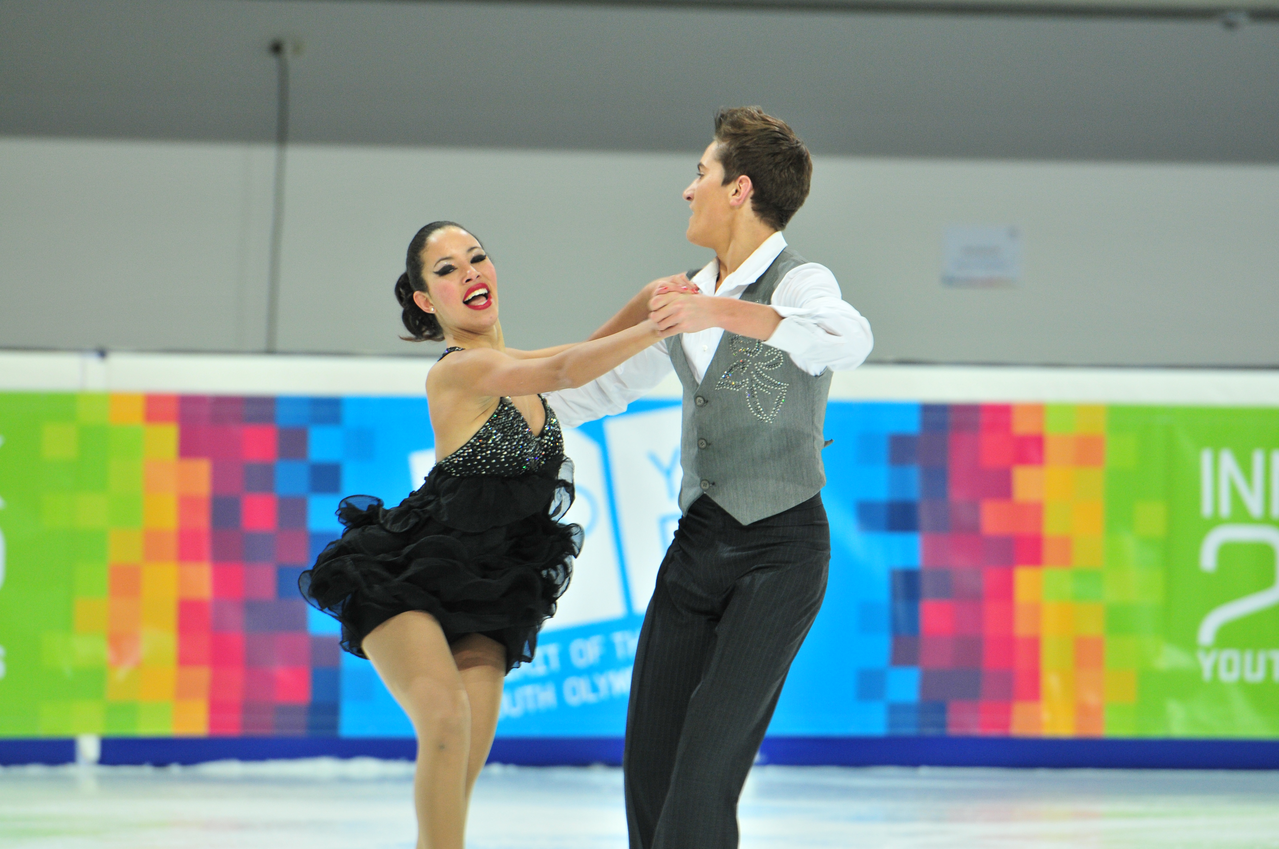 1. Jugendolympiade 2012 Innsbruck